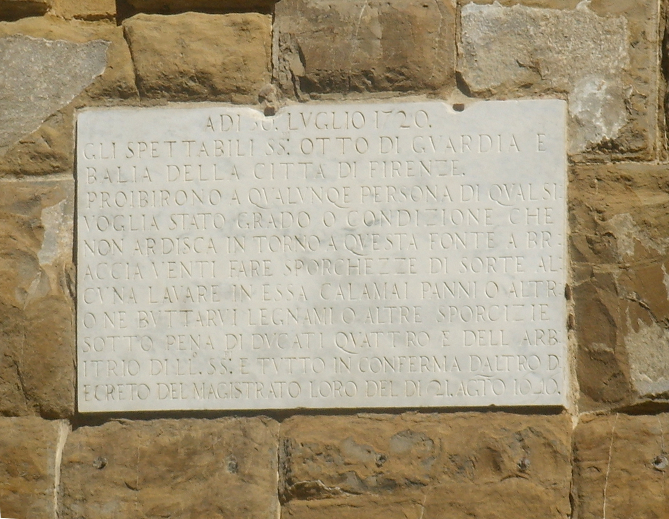 Palazzo Vecchio plate in Florence, italy